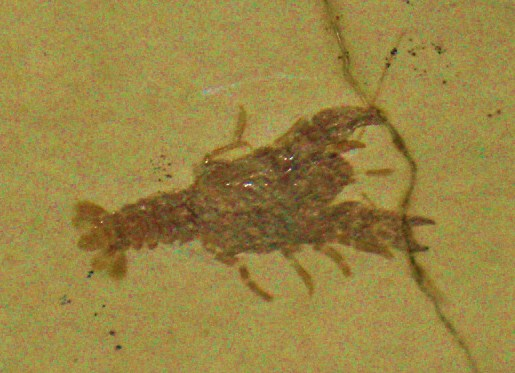 Fossil of Pustulina, an extinct crustacean- Took the photo at Fossil Show, Munchen 2011